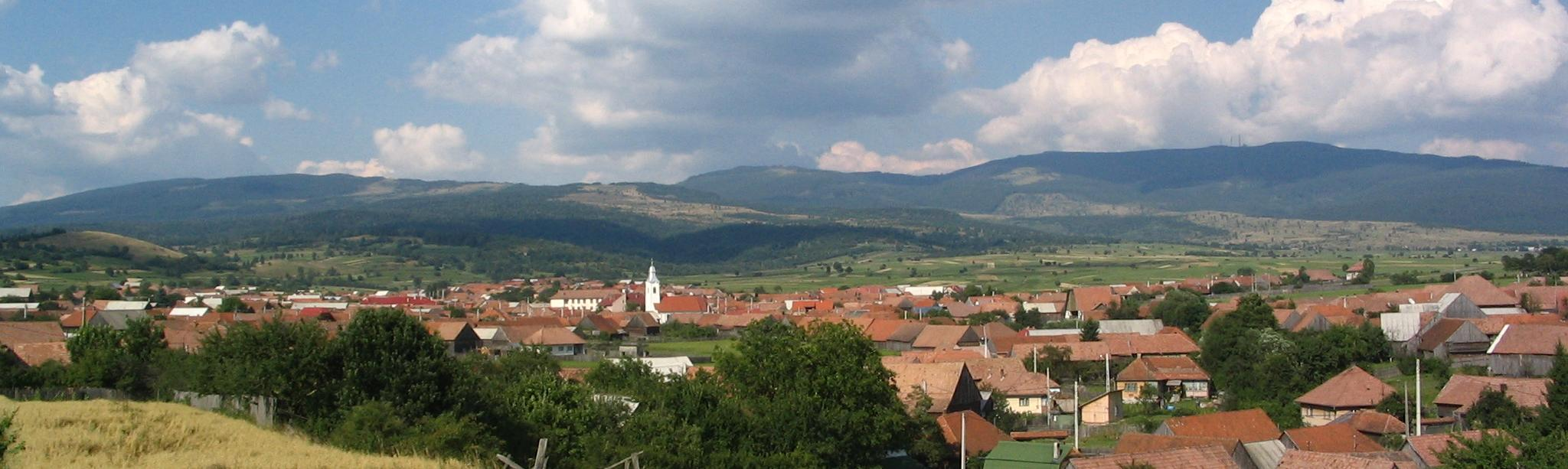 Kápolnásfalu (Capalnita) és a Központi-Hargita (Central-Hargita).